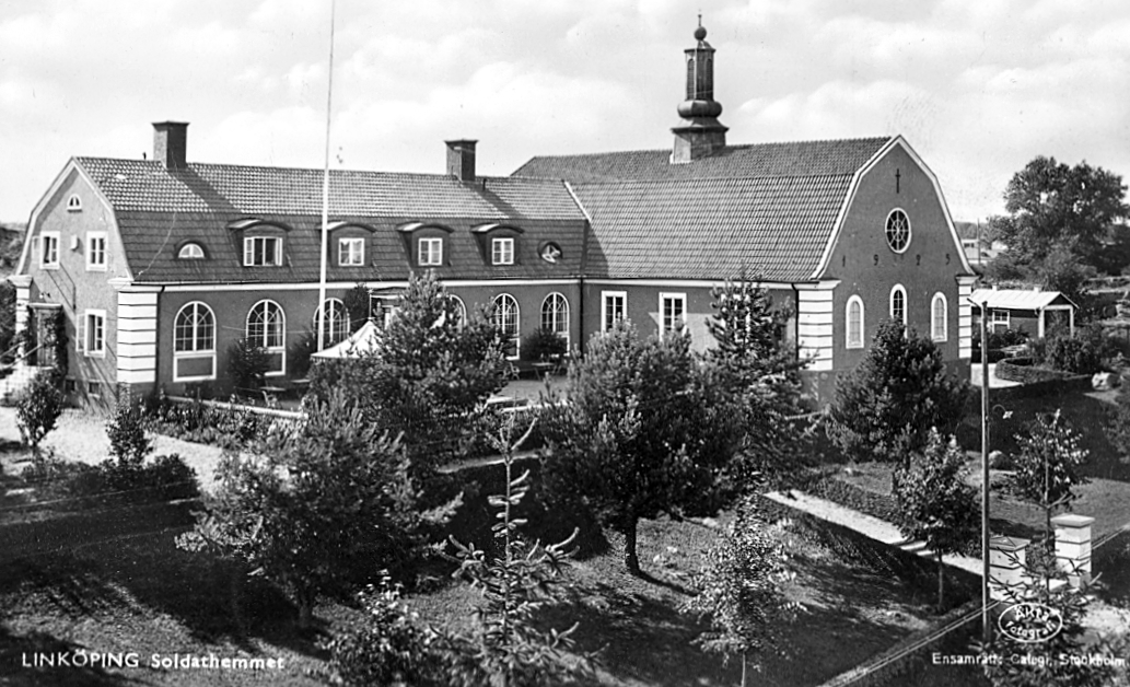 Gamla soldathemmet vid Smedstadsvägen 10 (Ekkällegatan) i Linköping. Fastigheten revs 1990.